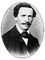 Theodor Frey Abgeordneter der badischen verfassungsgebenden Versammlung 1849